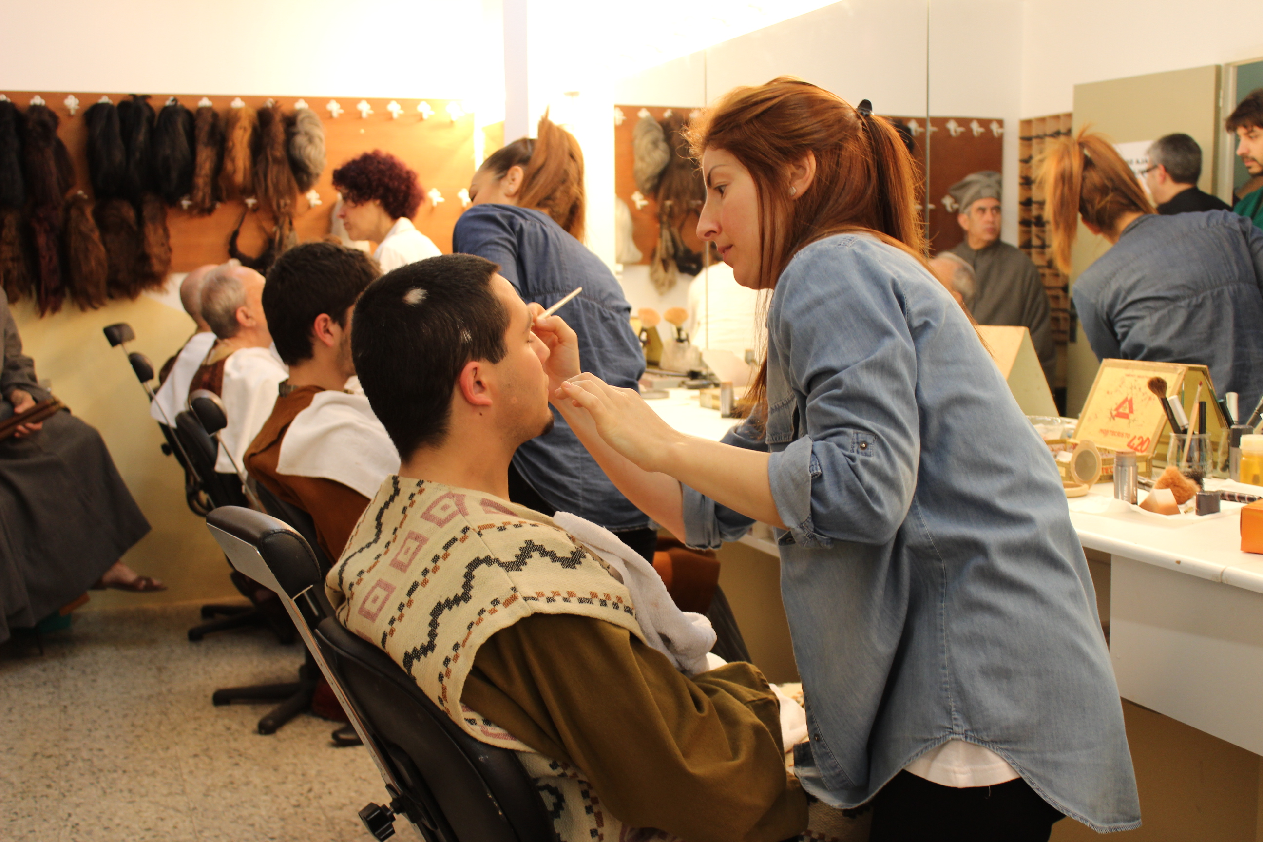 La Passió d'Olesa. Activitat darrere l'escenari abans i durant una representació. Sala de maquillatge.